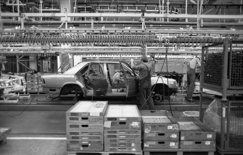 Juni 1988 Stuttgart, Daimler-Benz-Werk in Untertürkheim